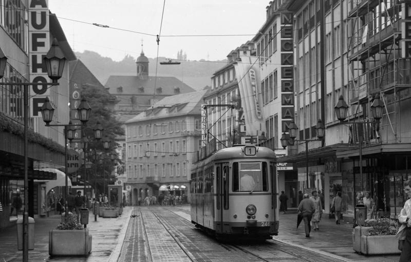 Juni 1988 Würzburg